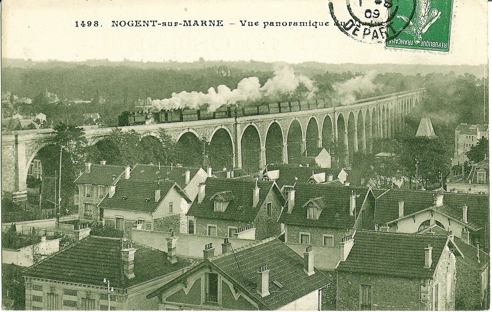 Carte postale ancienne N°1498 (éditeur inconnu)NOGENT-SUR-MARNE : Vue panoramique du Viaduc